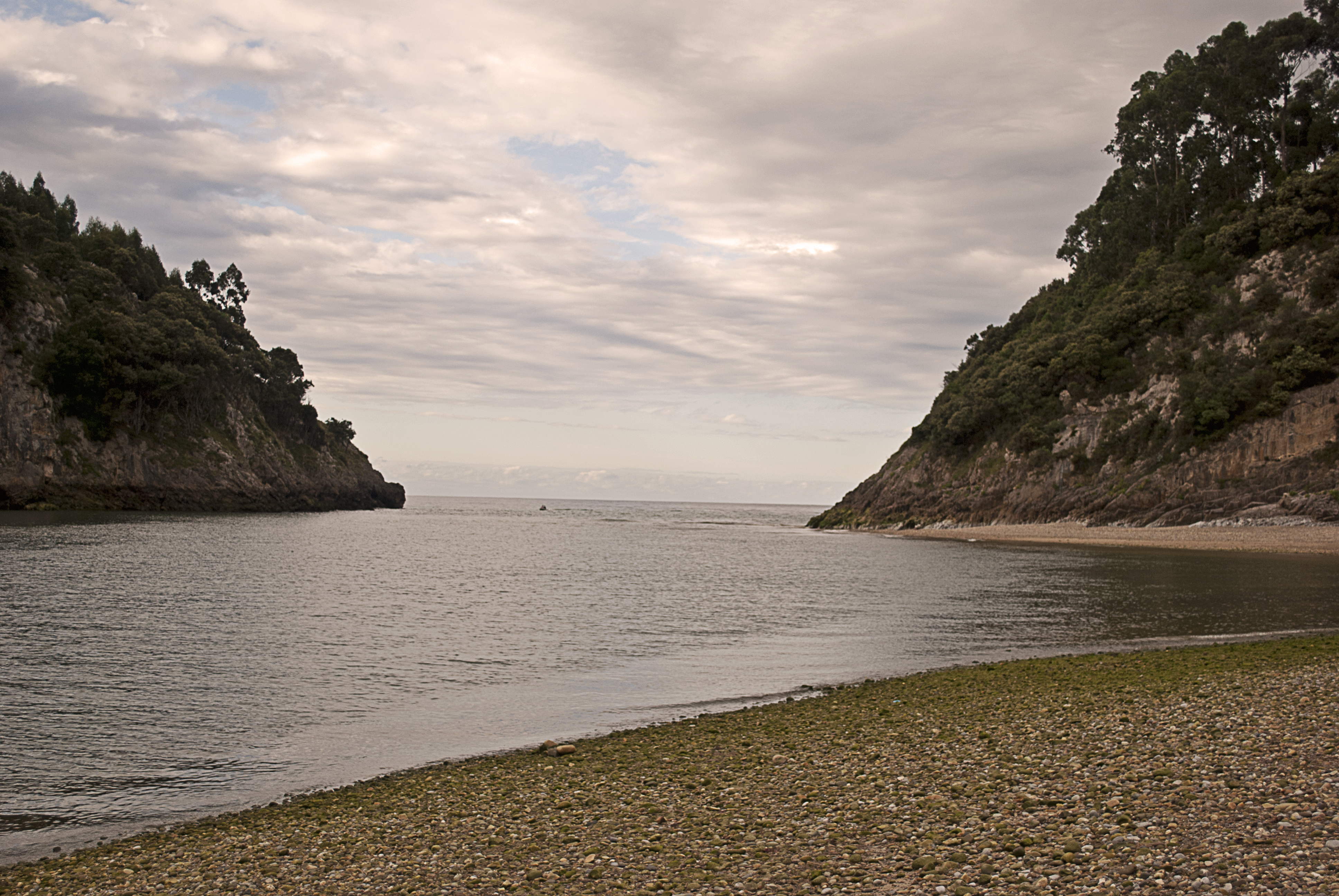 Playa del Pedrero, desembocadura del río Deva en la ría Tina Mayor, localidad de Pechón, municipio Val de San Vicente. Cantabria, España.